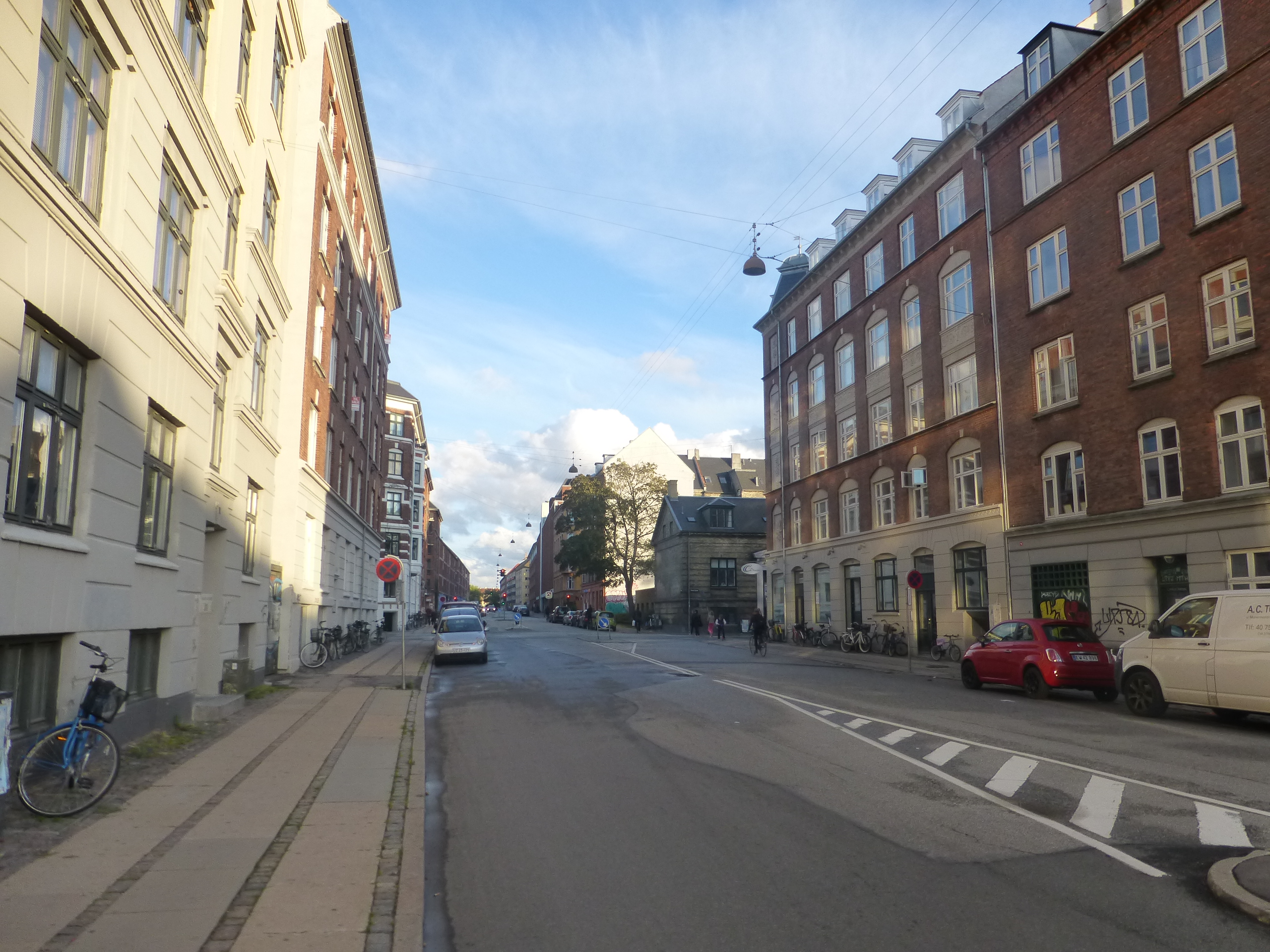 The street Mimersgade in Nørrebro in Copenhagen.